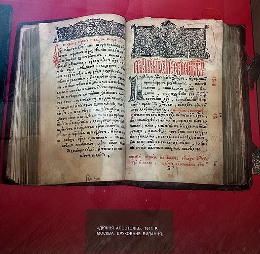 1644 год